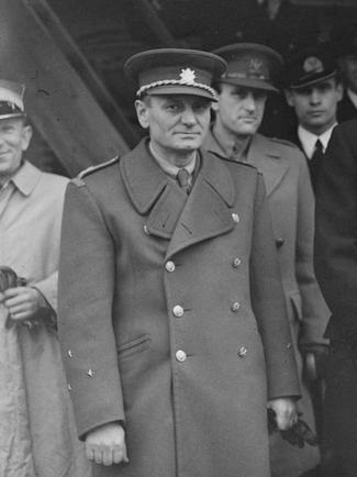 Sergěj Ingr na palubě polské ponorky "ORP Wilk", operující z Británie.